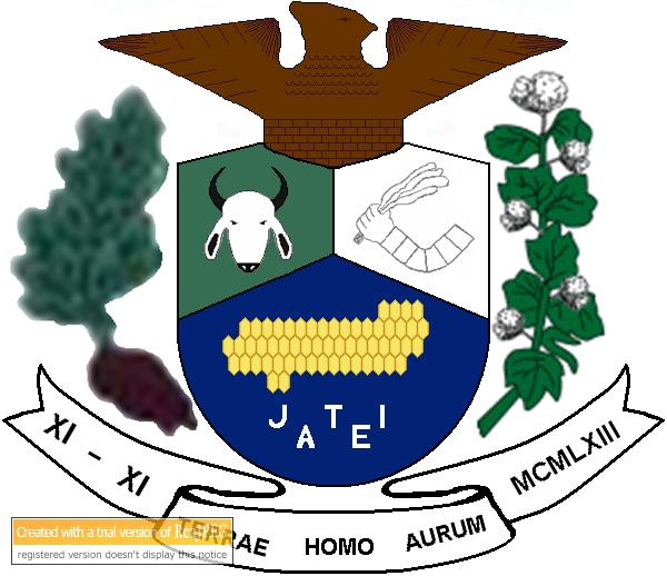 Brasão do município de Jateí